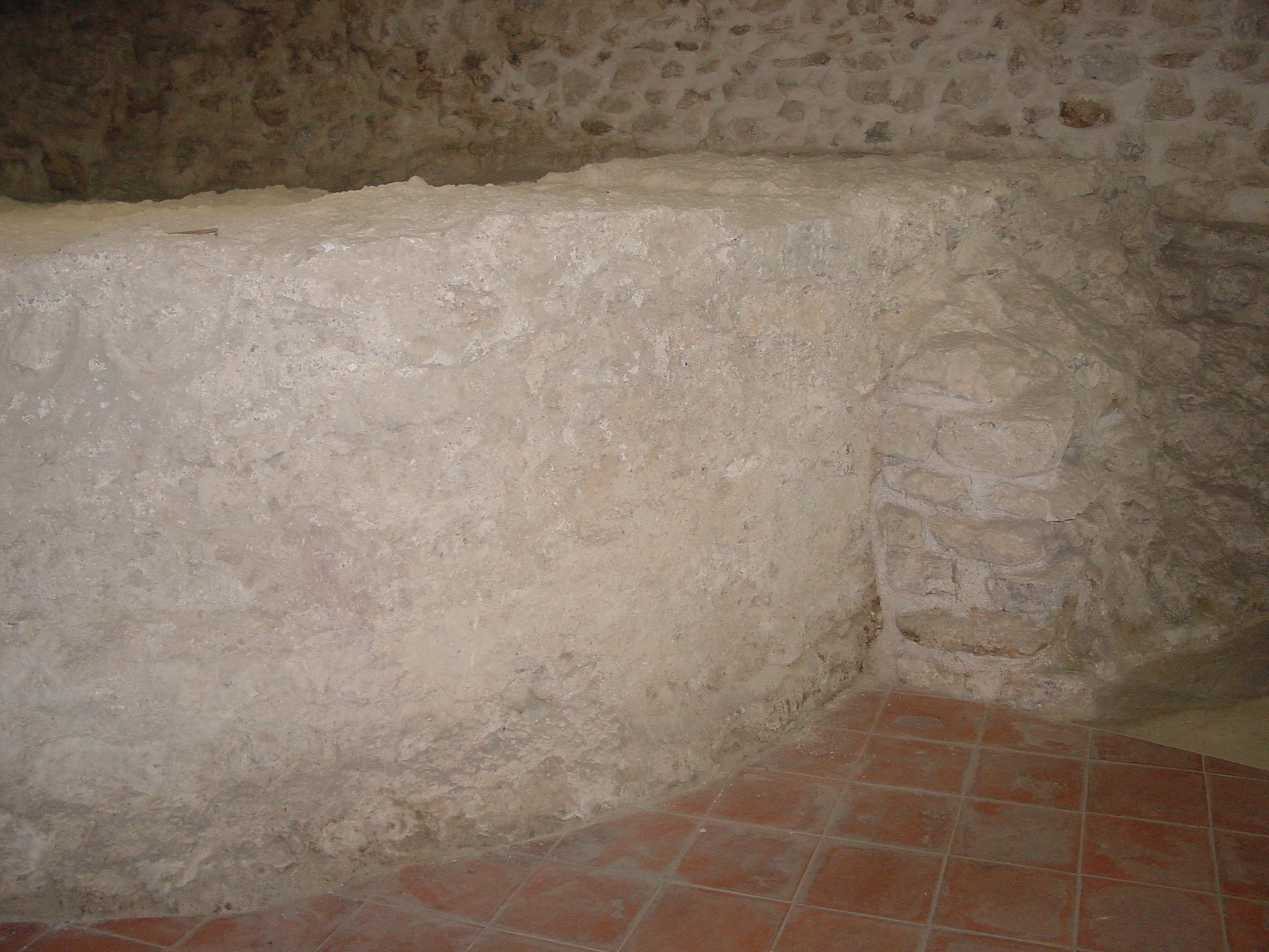 Valladolid, España. Vestigios de la muralla del siglo XII-XIII en el monasterio de San Benito, antiguo alcazarejo. Arqueología en 1990.